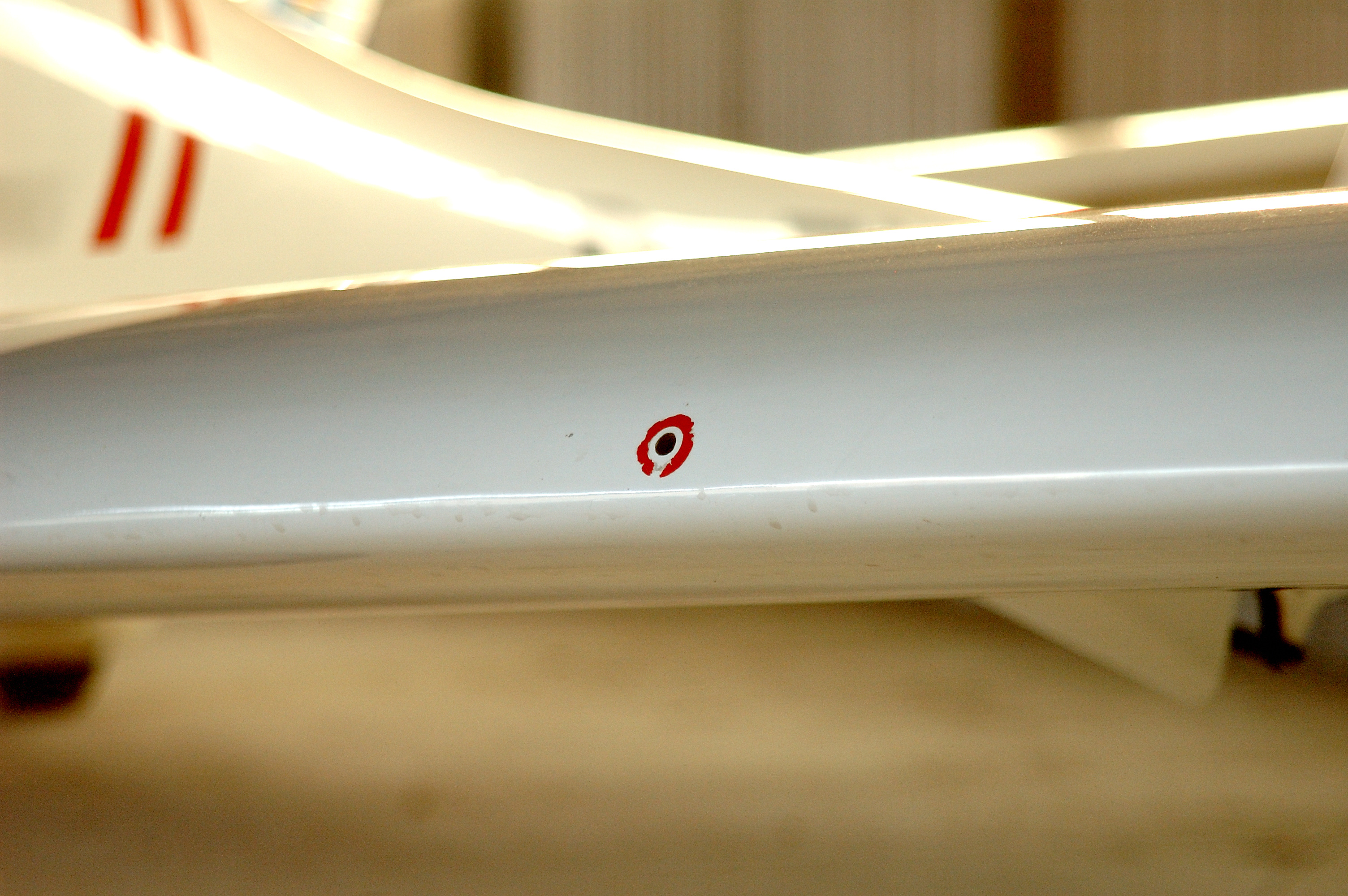 Unterdrucklock für die Überziehwarnanlage an der Flügelvorderkante einer Diamond DV-20 Katana